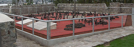 Maqueta de la Batalla del Cinco de mayo de 1862 en Puebla creada por el Escultor Miguel Michel